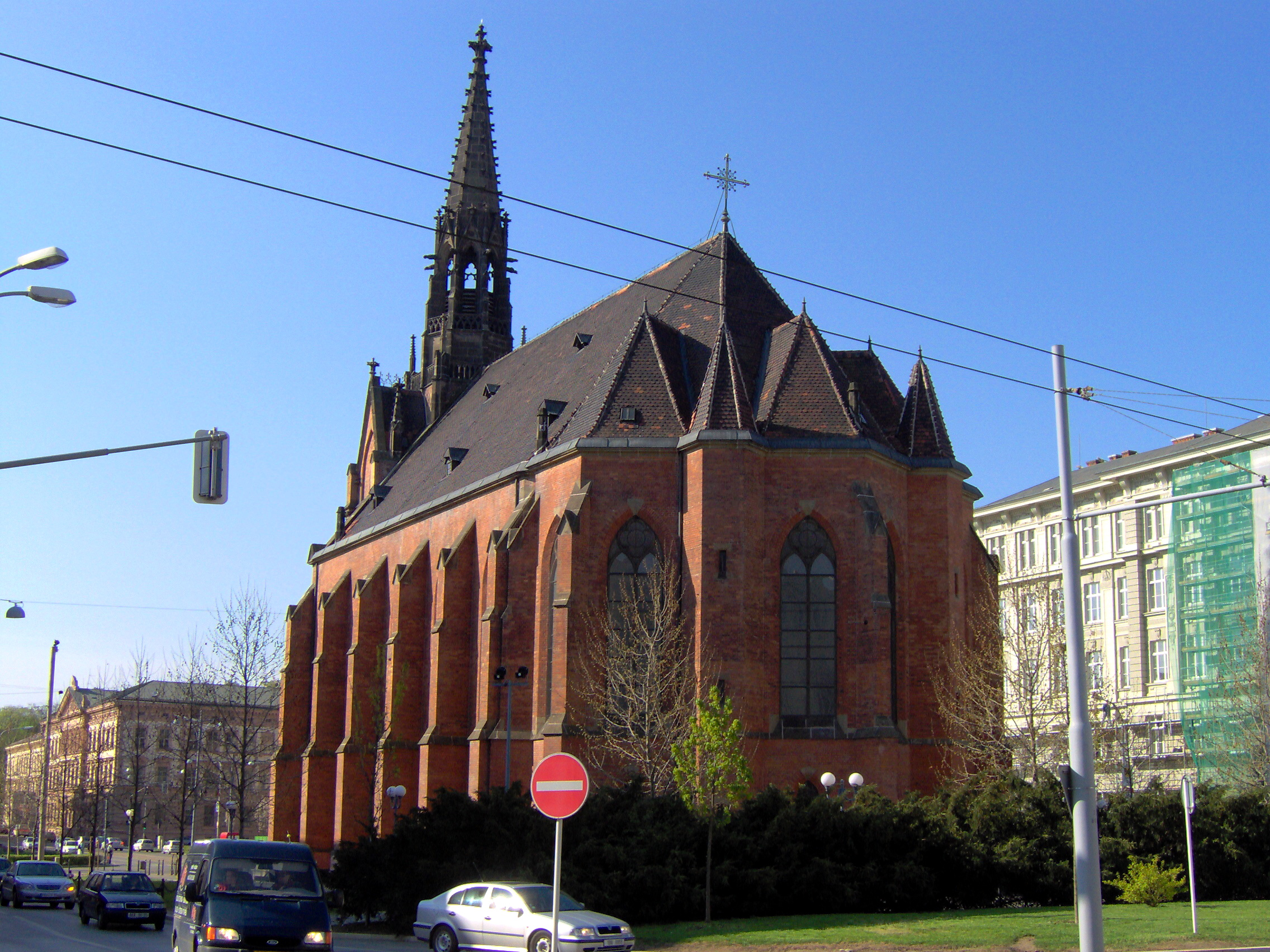 Pohled na Červený kostel v Brně od "Bílého domu"